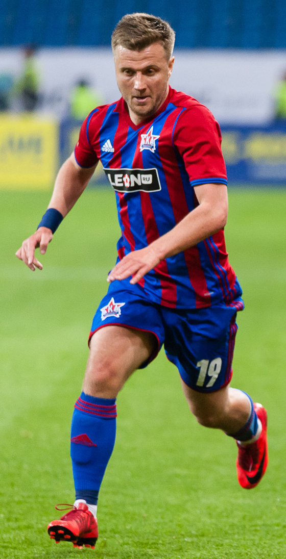 «Ростов» провел первый матч на новой арене